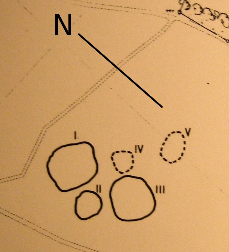 Lage der Grabhügel auf dem Feufbühl in Zollikon